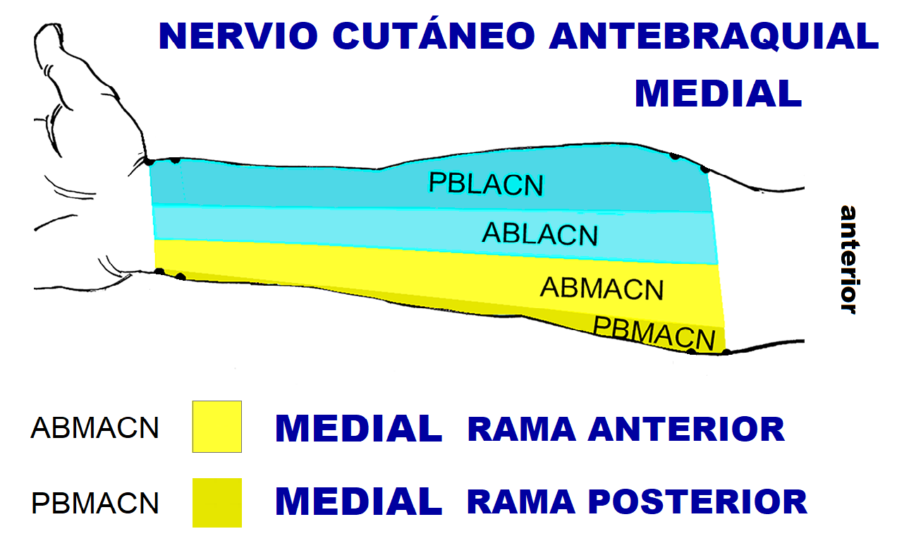 Figura 4. Patrón de distribución y área de inervación del nervio cutáneo del antebrazo. Medial Rama Anterior en amarillo claro. Medial Rama Posterior en amarillo oscuro.